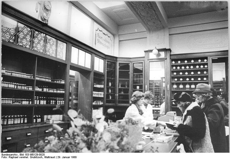 Leipzig, Apotheke, "Zum weißen Adler" ADN-ZB Raphael 29.1.80 Leipzig: Der Dichter Theodor Fontane war in der Leipziger Apotheke "Zum weißen Adler" von 1841 bis 1842 als Apothekengehilfe tätig. Heute präsentiert sich die historische Adler-Apotheke, die vor 276 Jahren von August dem Starken zur Hofapotheke ernannt worden war, frisch restauriert im Jugendstilgewand. Sie bereichert das Leipziger Stadtzentrum um eine weitere sehenswerte Einrichtung.